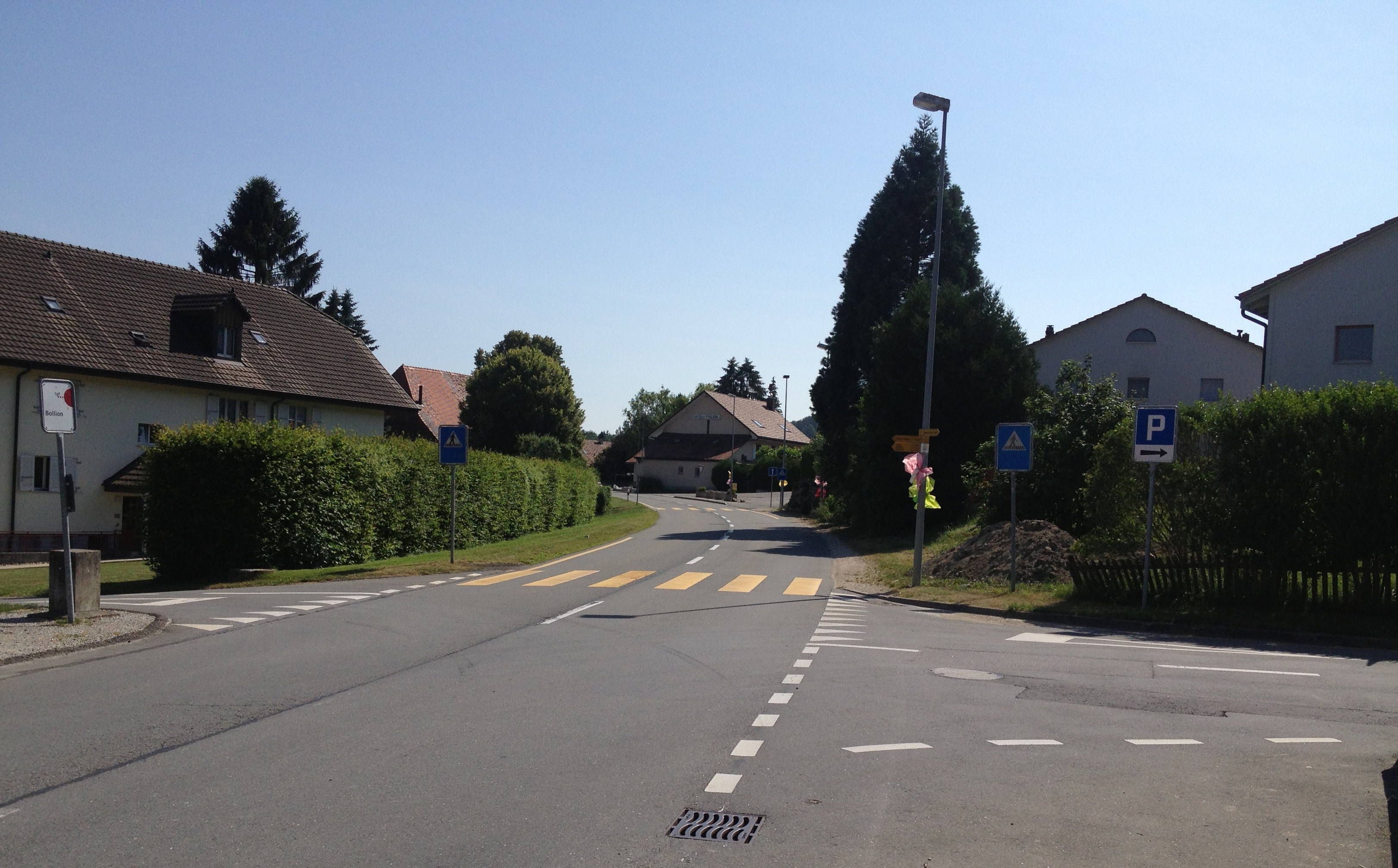 Bollion dans la commune fribourgeoise de Lully en Suisse.